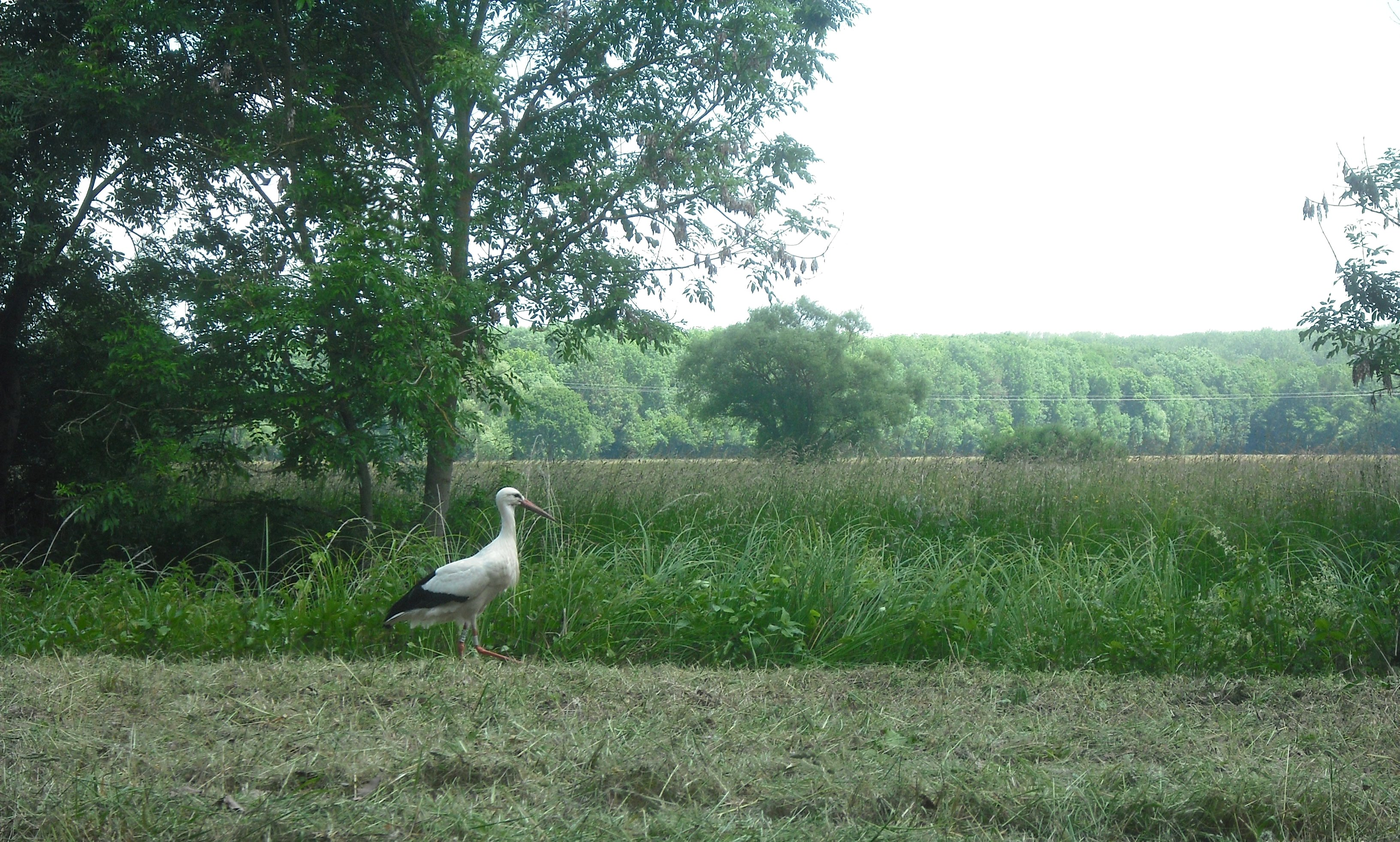 Le Grand Ried a Sélestat, Sélestat, Bas-Rhin, France.